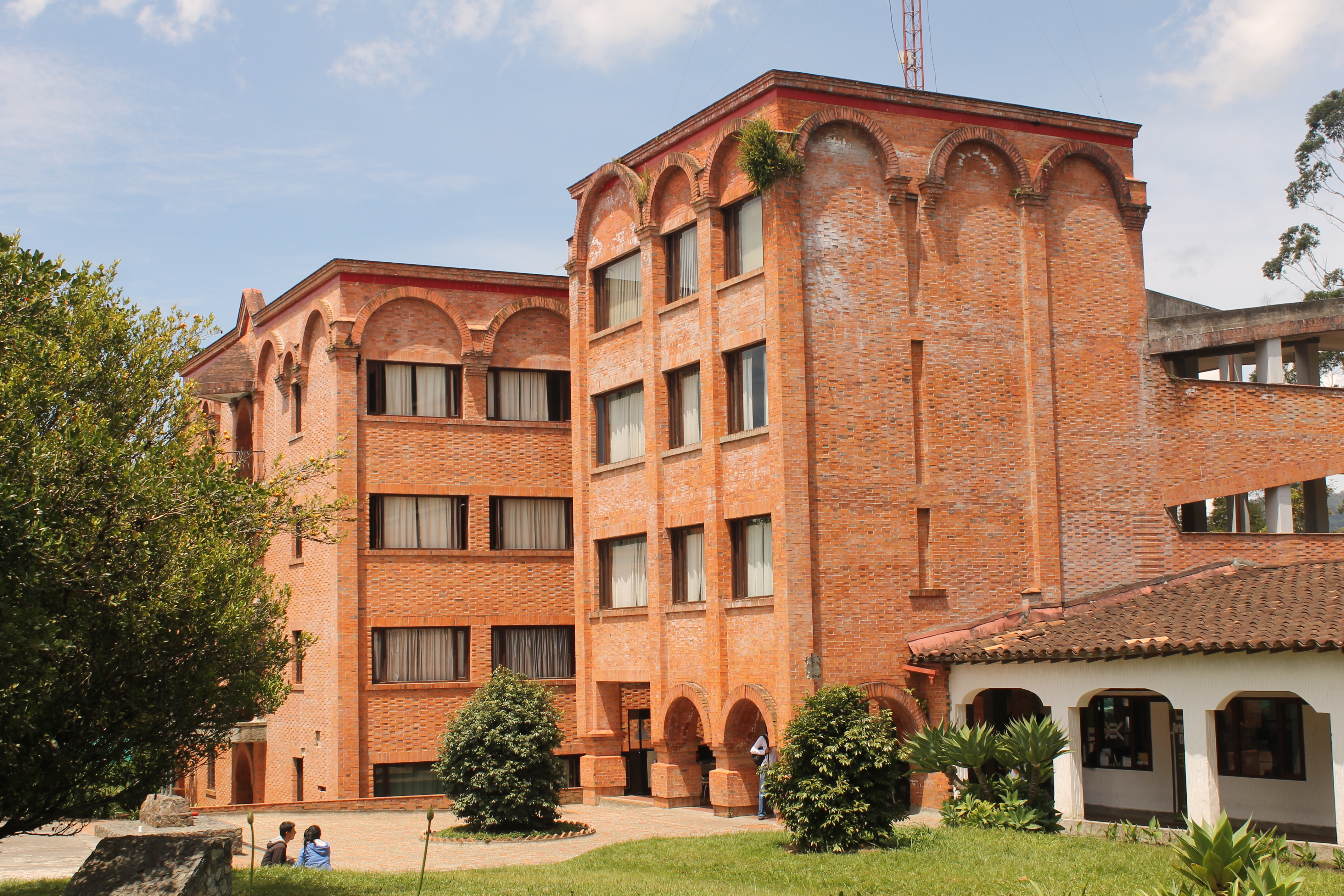 Universidad de Antioquia, Seccional Oriente, situada en la vereda Quirama de El Carmen de Viboral